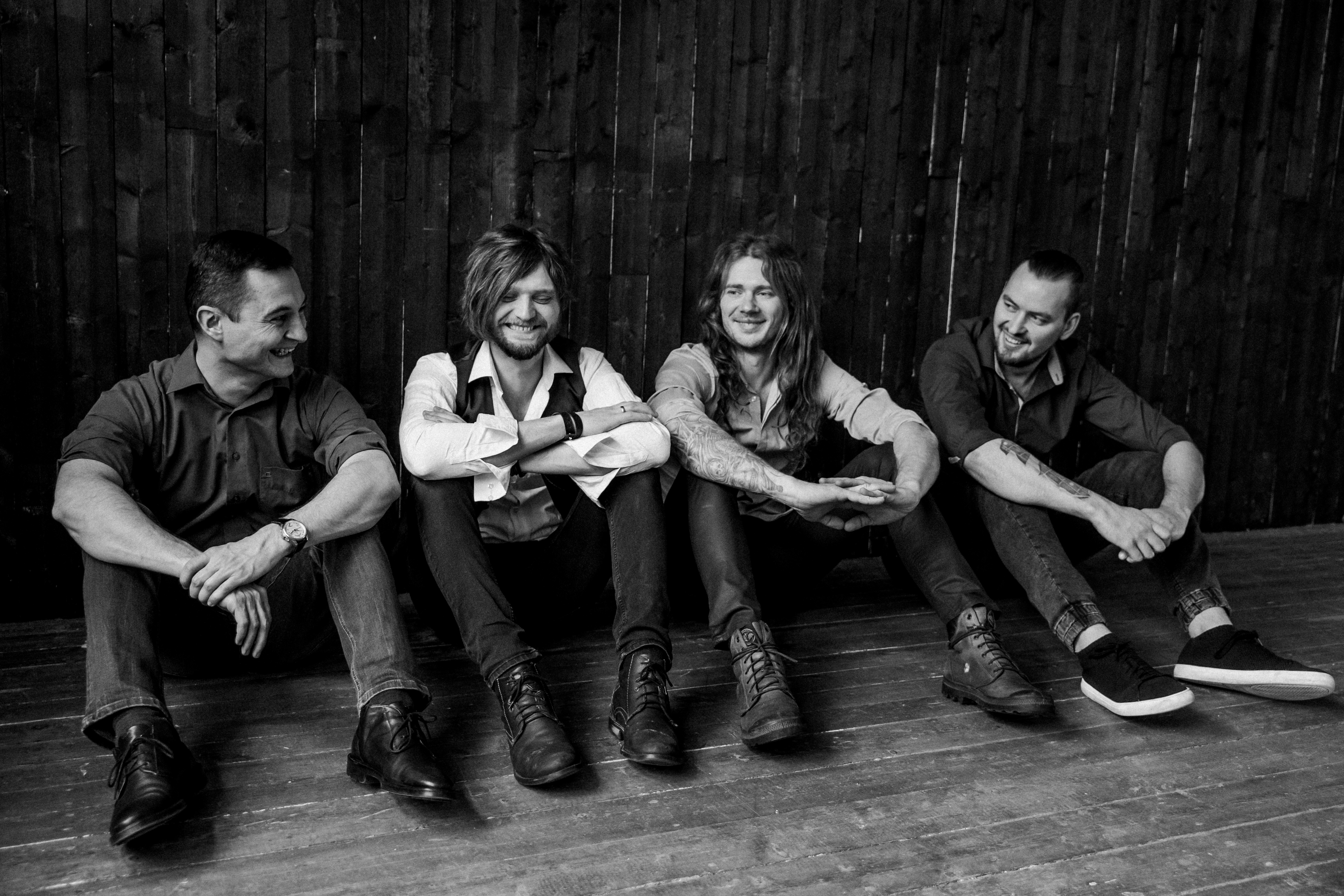 Grupa "Laime Pilnīga"